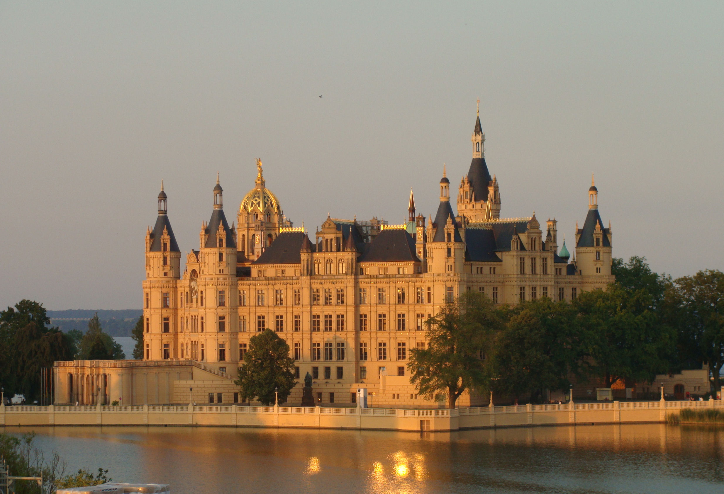 Schweriner Schloss Abendstimmung am 2209-07-03